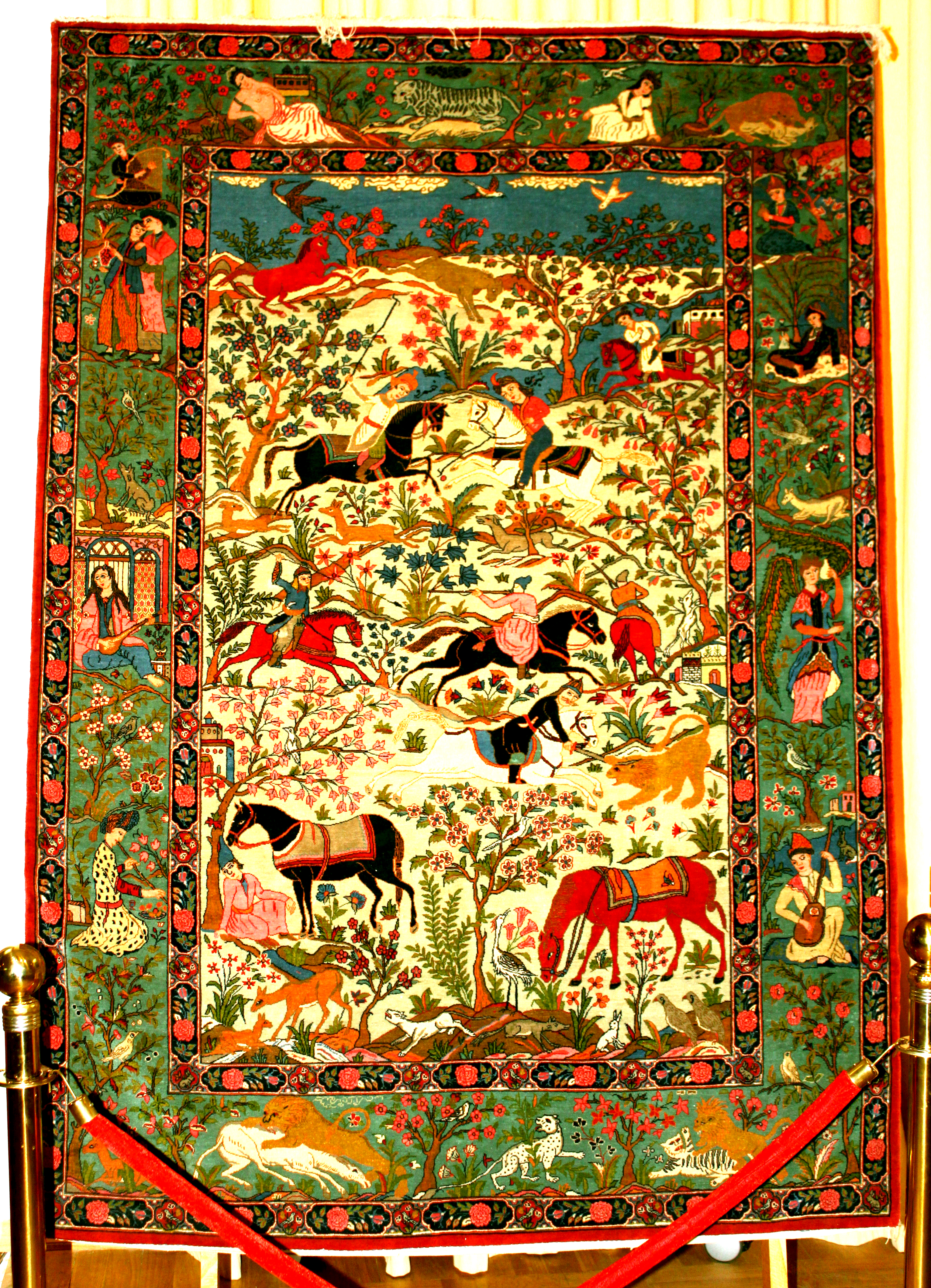 Nizaminin eyniadlı poemasının motivləri əsasında toxunmuş "Xosrov və Şirin" xalçası